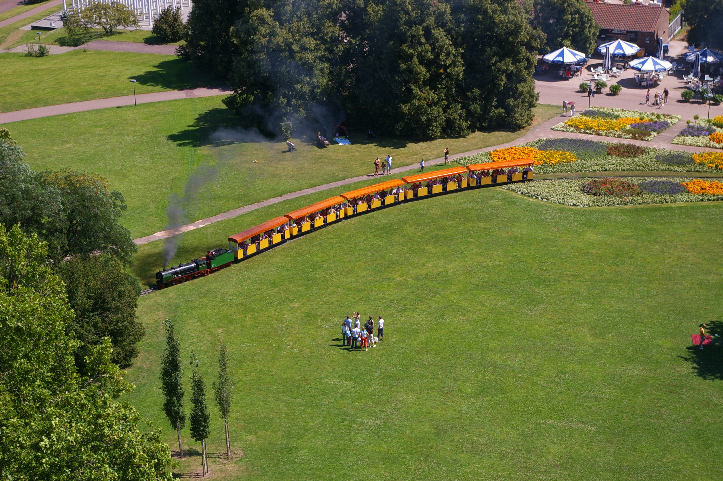 Die Dampflok Tazzelwurm vom Killesbergturmm aus gesehen. Aufnahme im August 2007.